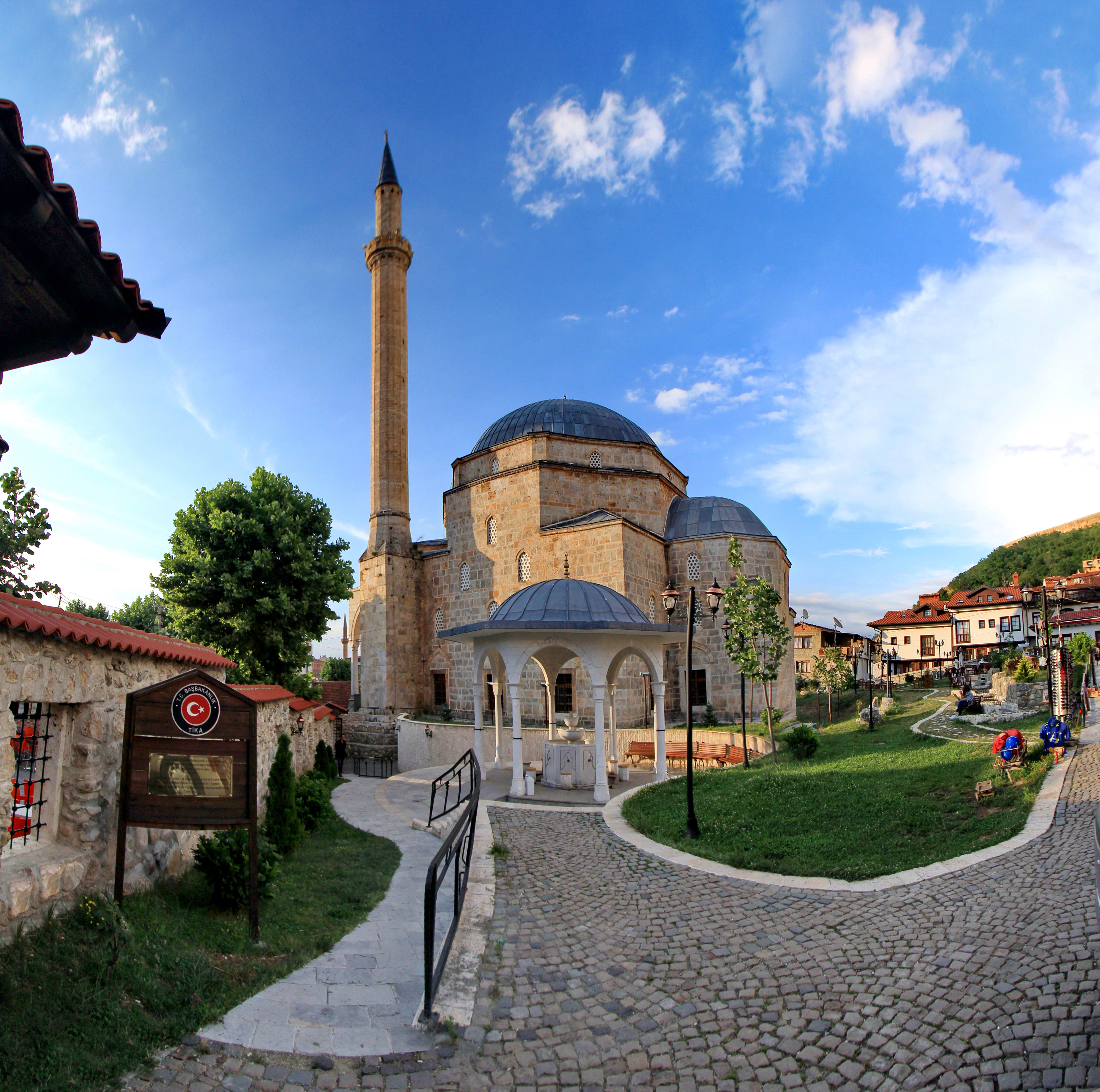 Xhamia e Sinan Pashës (Prizren)